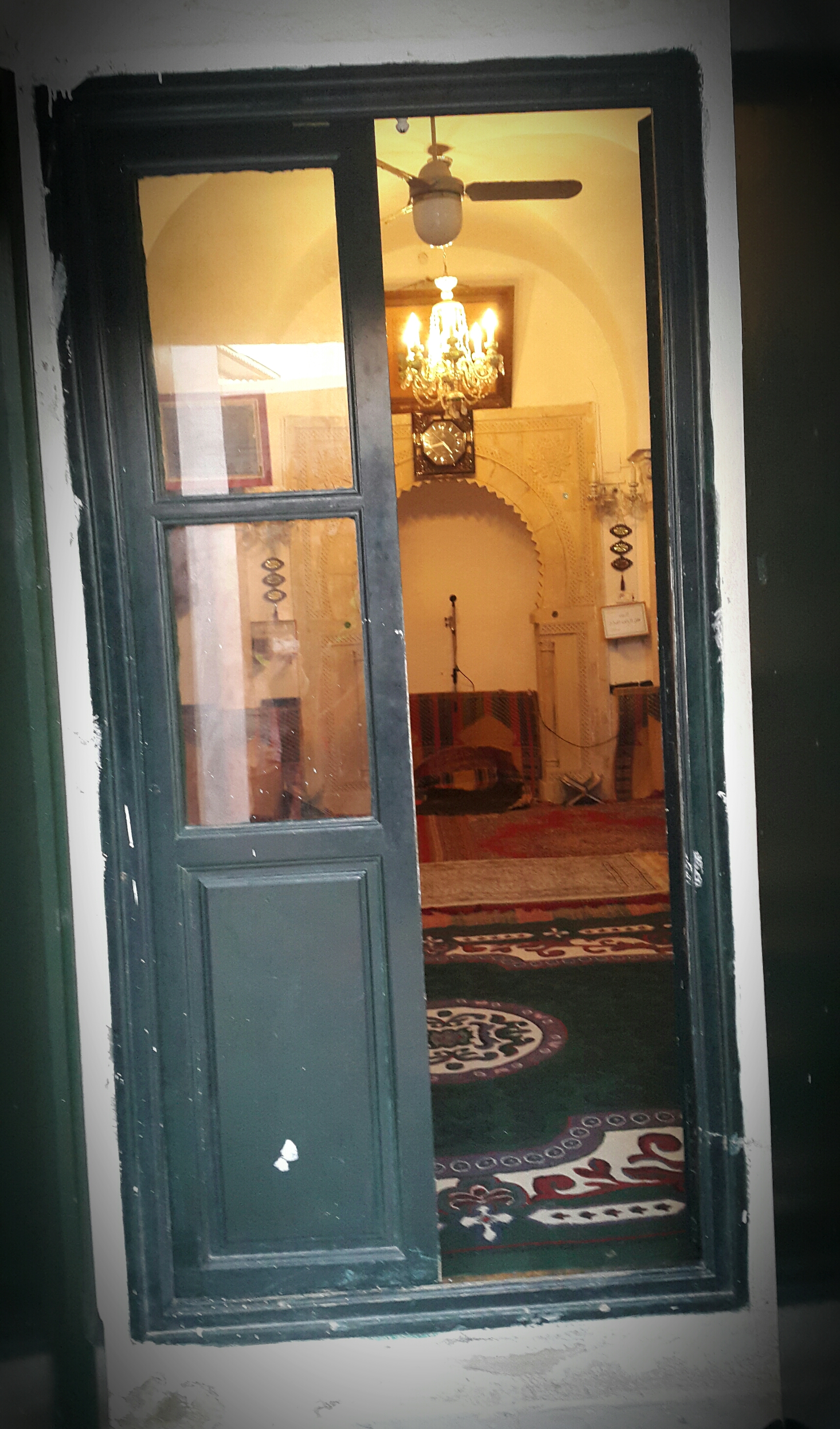 مسجد سيدي بوسعيد الباجي